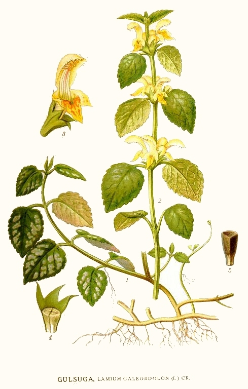 Original Description Gulsuga, Lamium galeobdolon (L.) Cr.